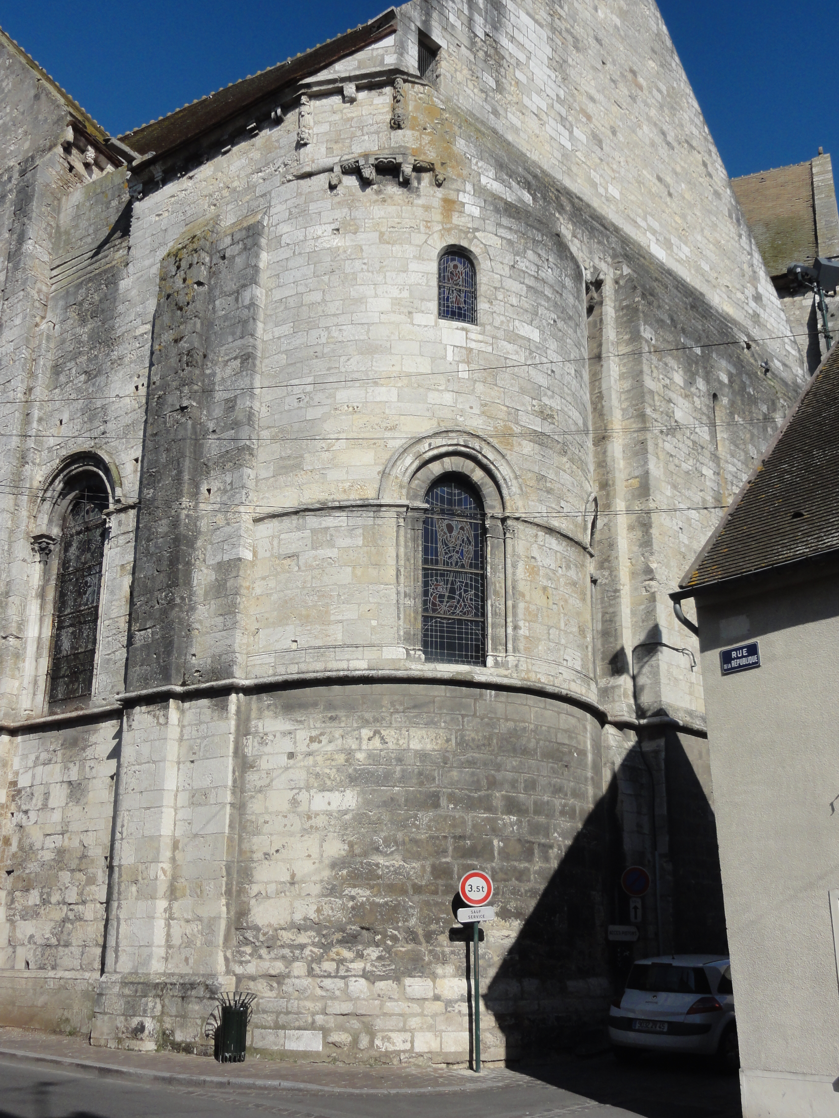 Angle sud-est, chapelle du St-Sacrement.